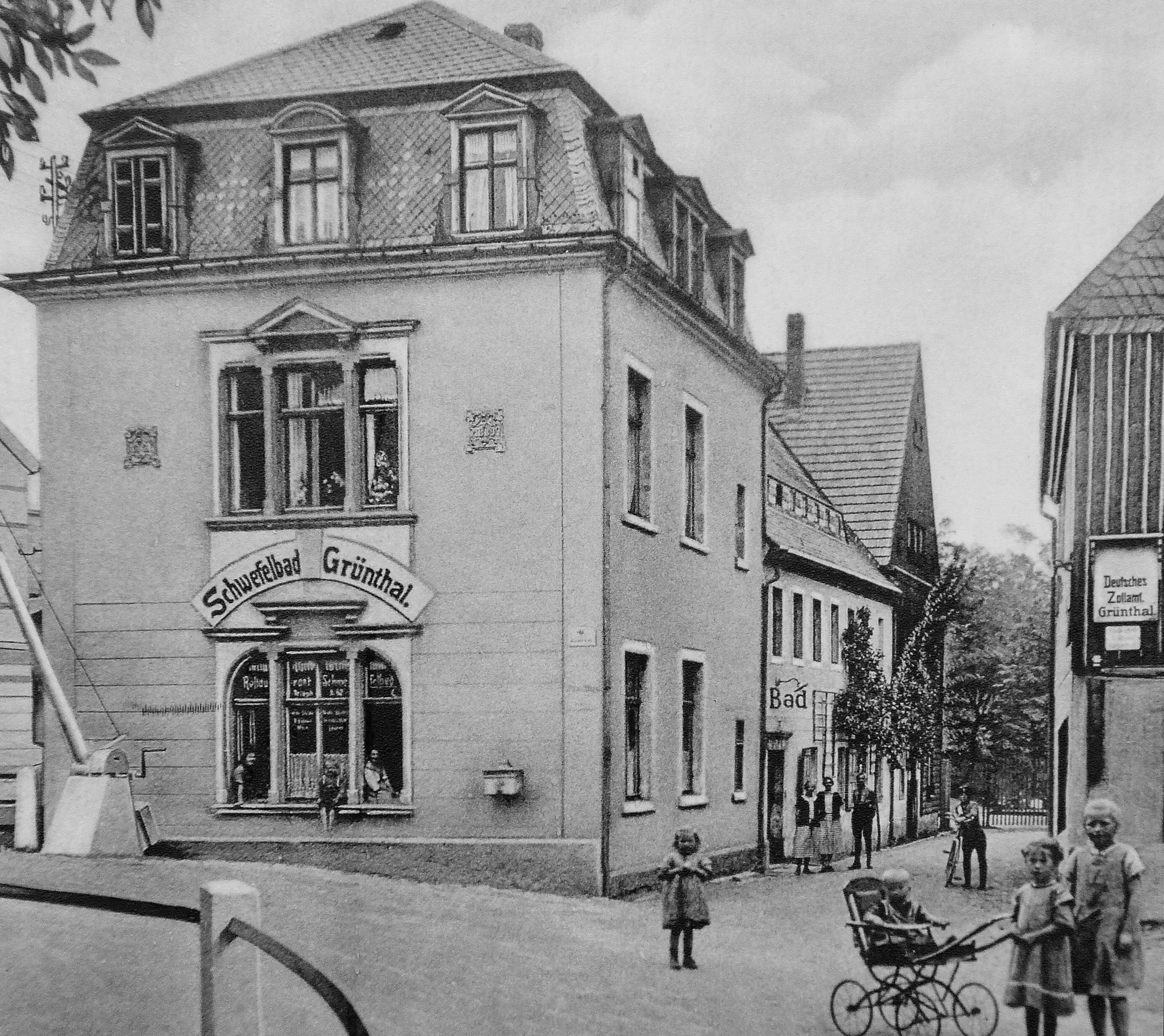 Schwefelbad Grünthal am Grenzübergang nach Böhmen (Postkarte von 1910)